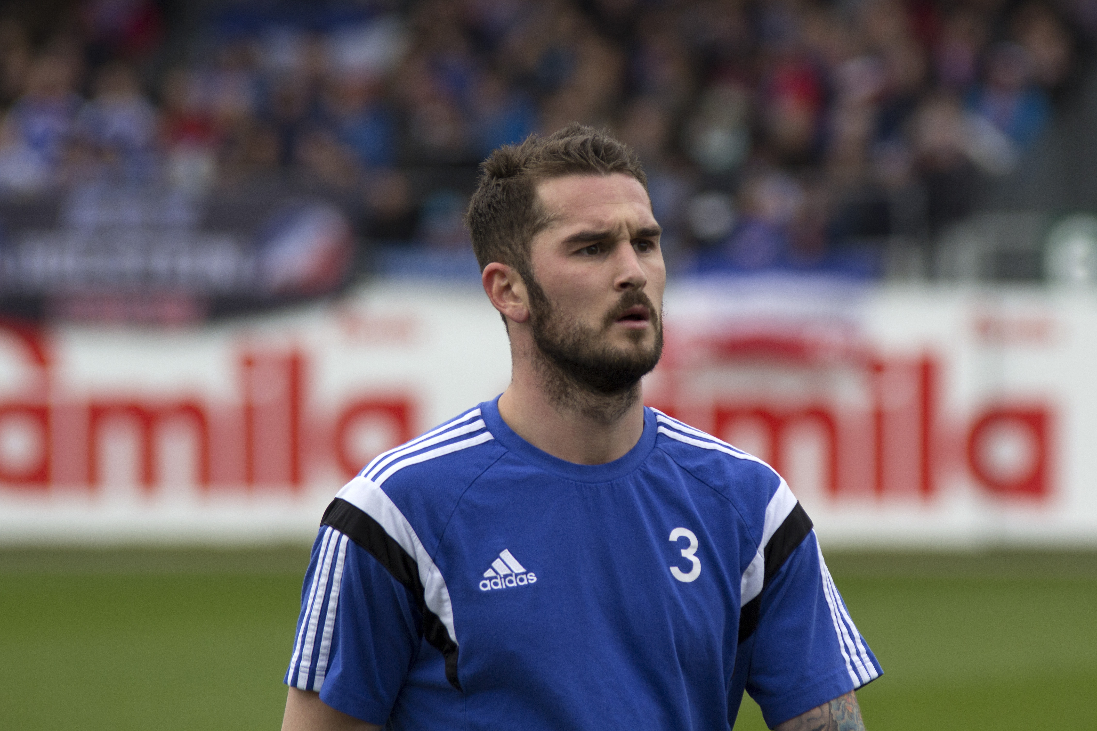 Dominik Schmidt (2016)